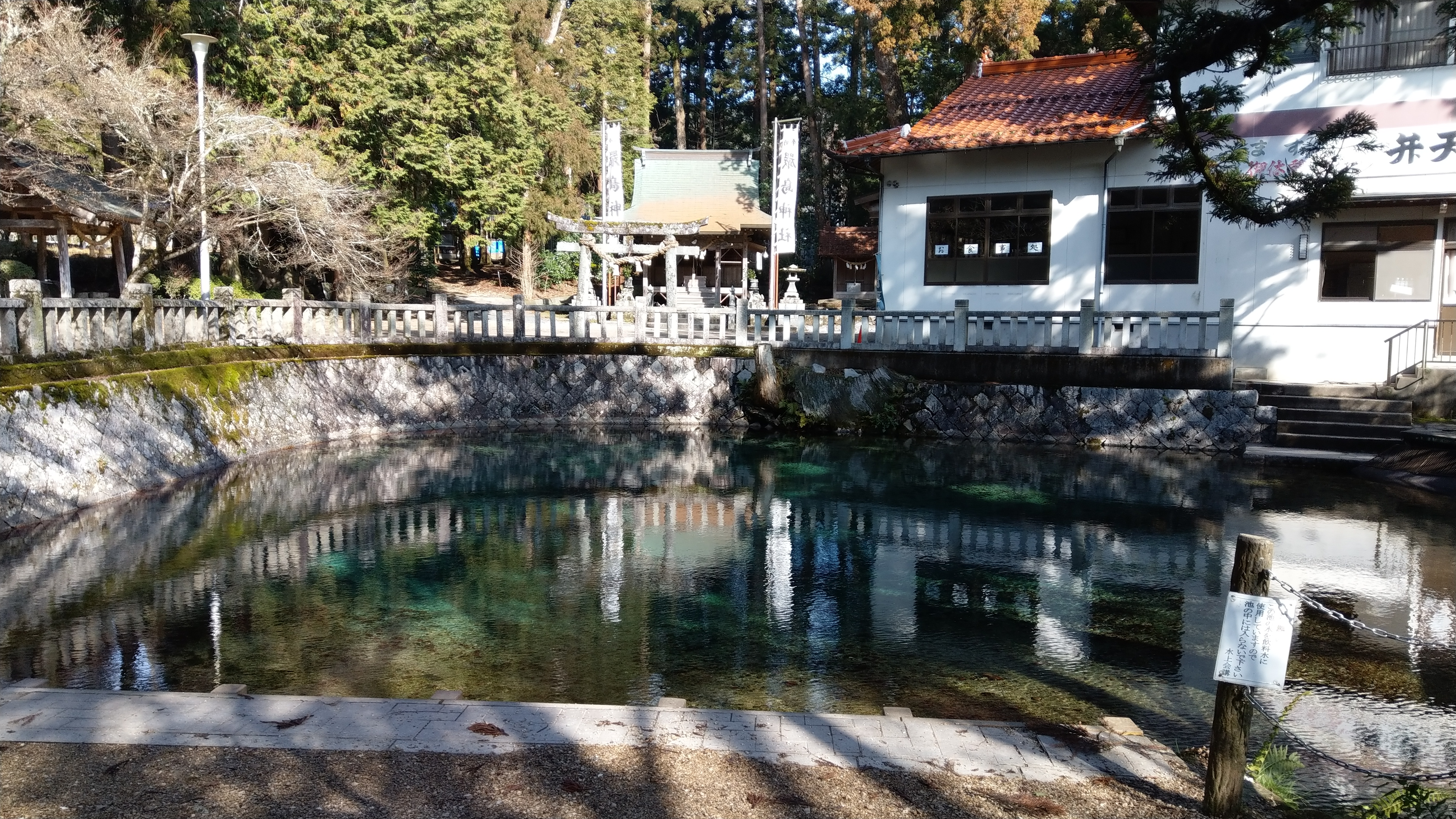 中文（台灣）: 位於日本山口縣美禰市別府地區的別府弁天池，後方為別府巖島神社